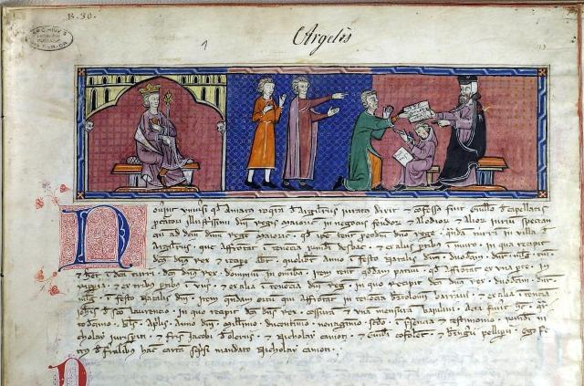 Capbreu d'Argeles (1292) Cote A.D.P.O : 1 B 30